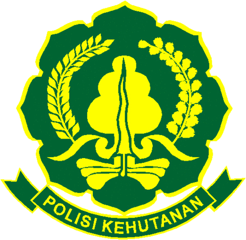 Gambar ini adalah Lambang Polisi Kehutanan Indonesia